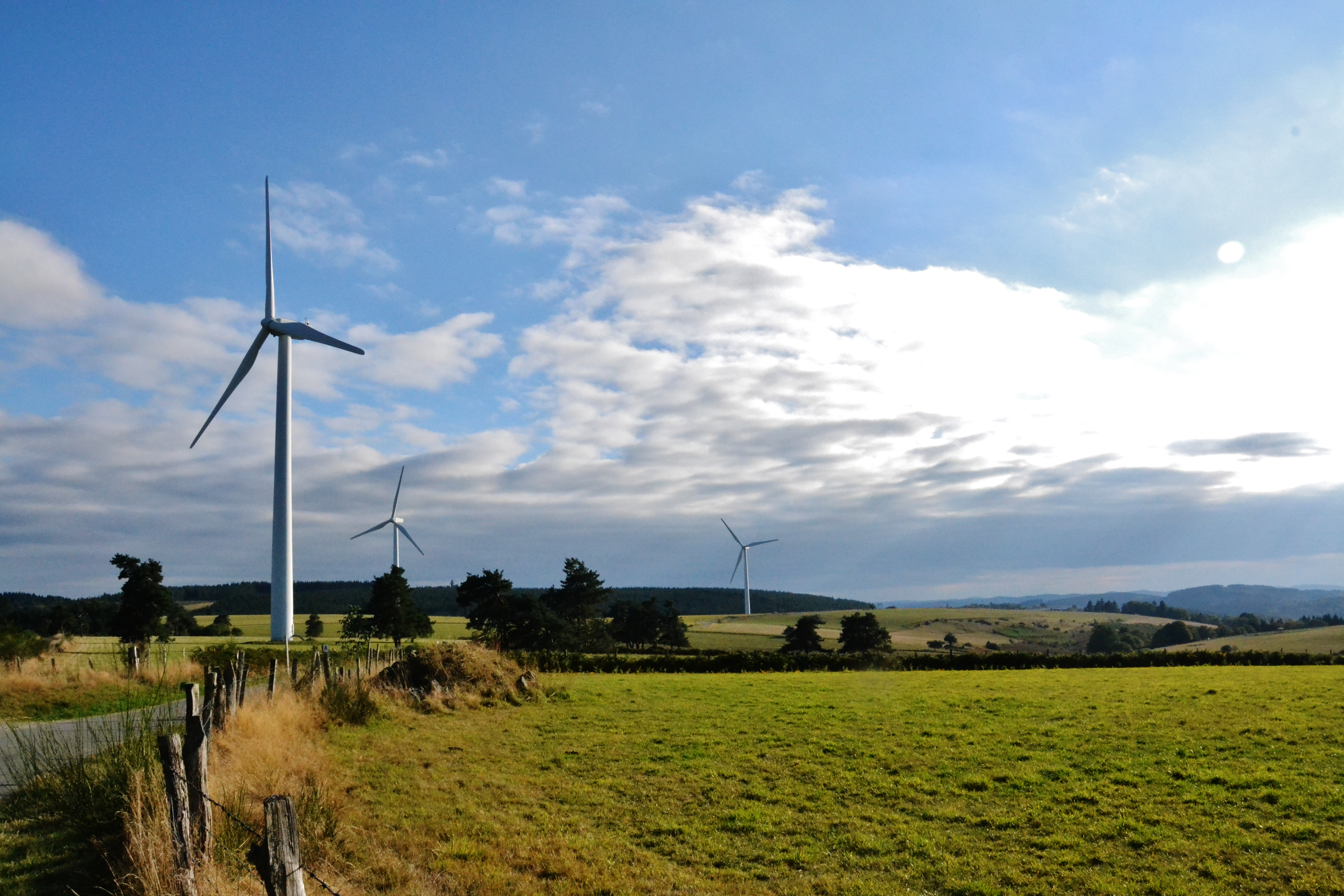 Les éoliennes de Peyrelevade-Gentioux, sur le plateau de Millevaches (Corrèze, France)